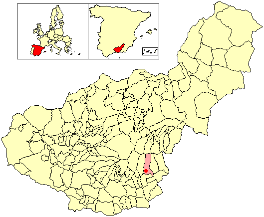 Situación de la localidad de Mecina Bombarón (en el municipio de Alpujarra de la Sierra) respecto a la provincia de Granada, en España.